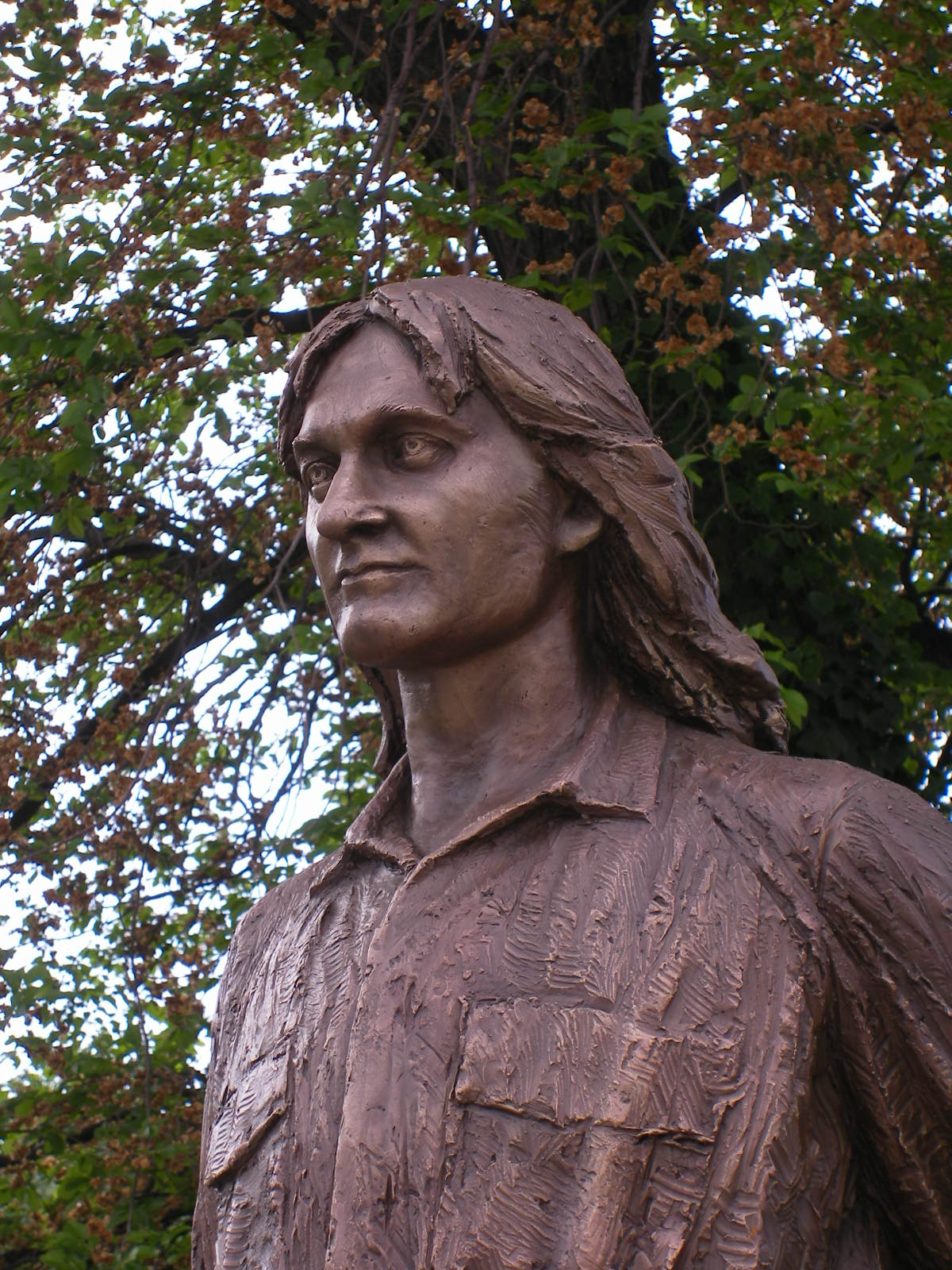 Komárom - Kaszás Attila szobra